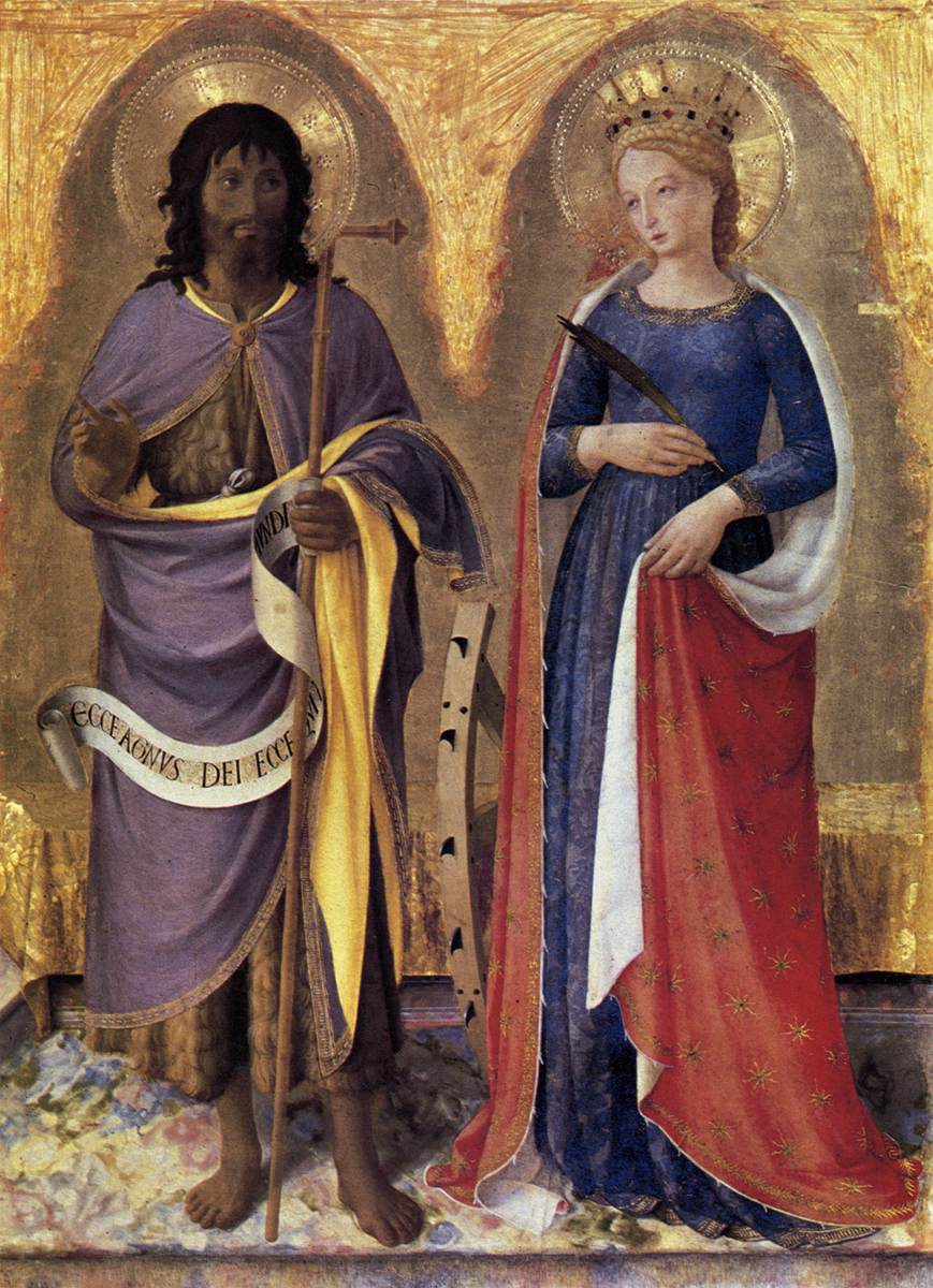 Perugia Altarpiece Tempera on panel, 95 x 73 cm